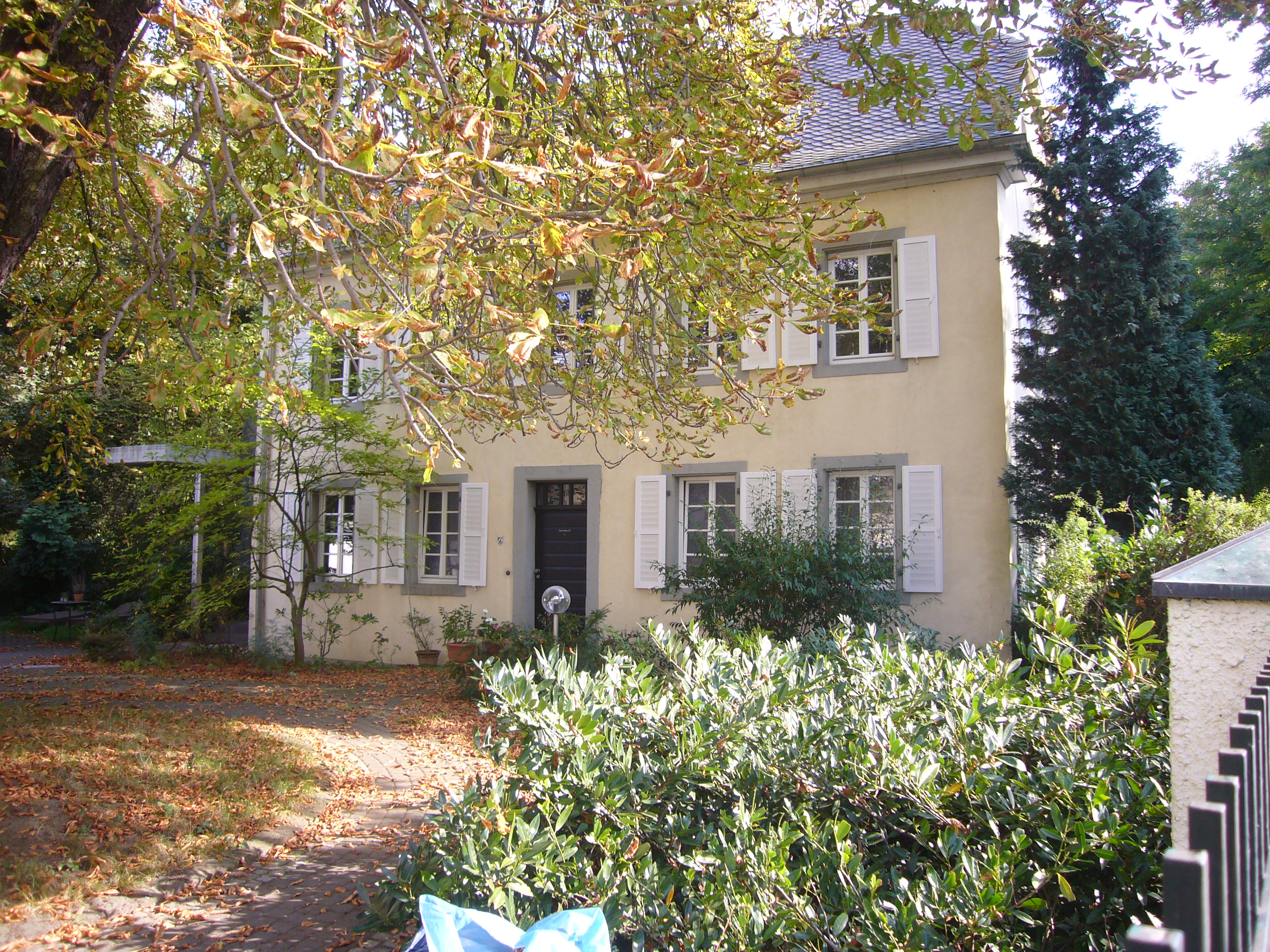 Der Hasenhof in der Rheinstraße 33/35 (hier: Rheinstraße 35) in Rüngsdorf, Bad Godesberg